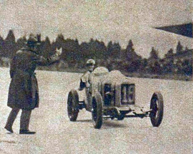 Henry Seagrave, vainqueur du Grand Prix de Provence 1926.